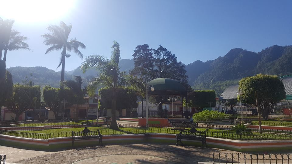 Parque Central